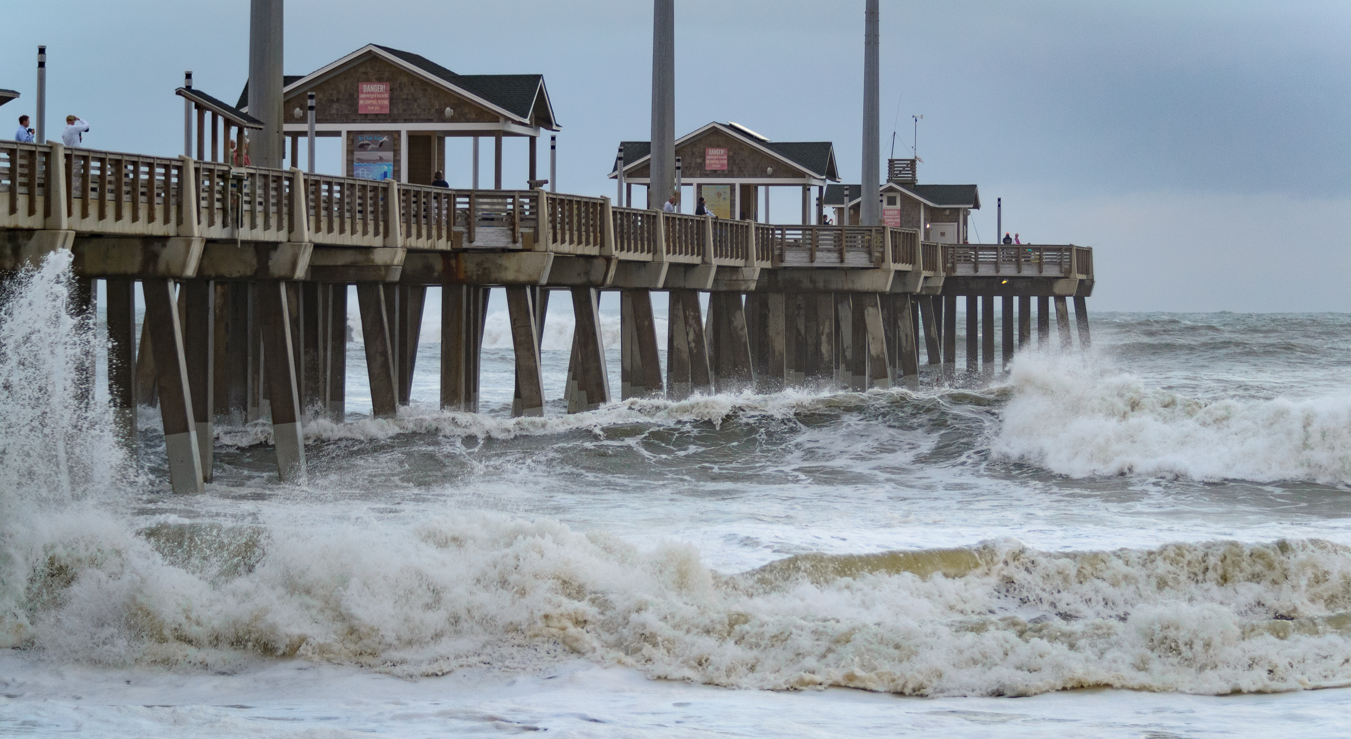 Jennette's Pier-3744